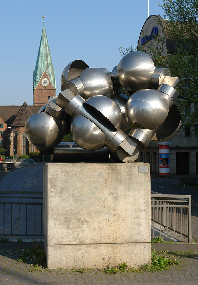 Hein Sinken: Kinetisches Objekt, 1973. Edelstahl. Kunst im öffentlichen Raum – ein Bremer Programm. Standort: Martinistraße/Ecke Balgebrückstraße. k: kunst im öffentlichen raum bremen